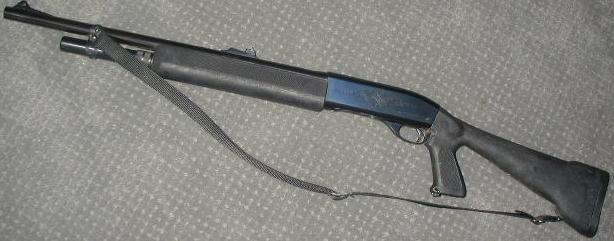 Senapang patah separa automatik jenis Remington M1100.